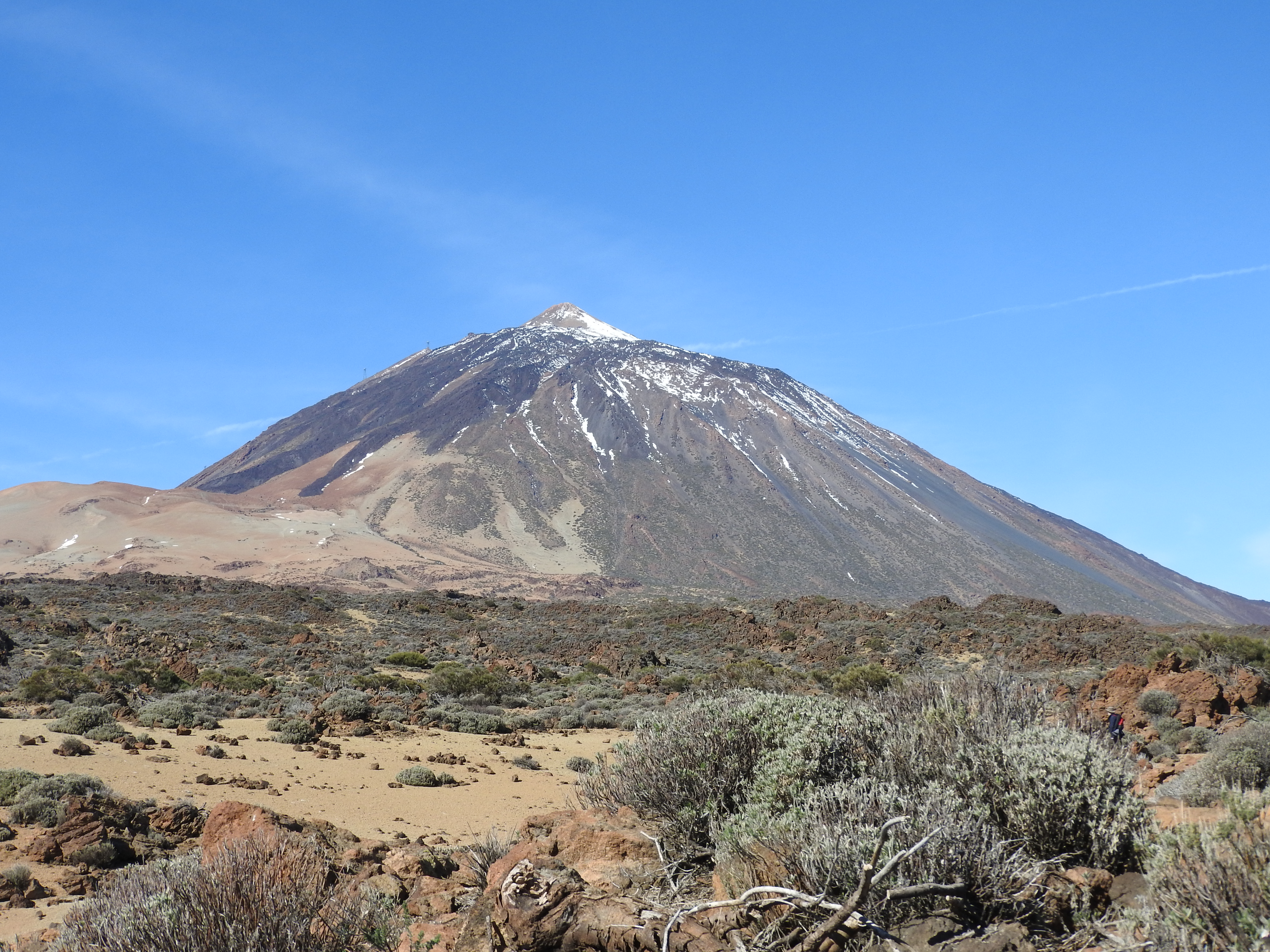 Fotografía del Teide desde un punto poco común. This is a photography of a Site of Community Importance in Spain with the ID: ES7020043. Natura2000 entry, EEA entry